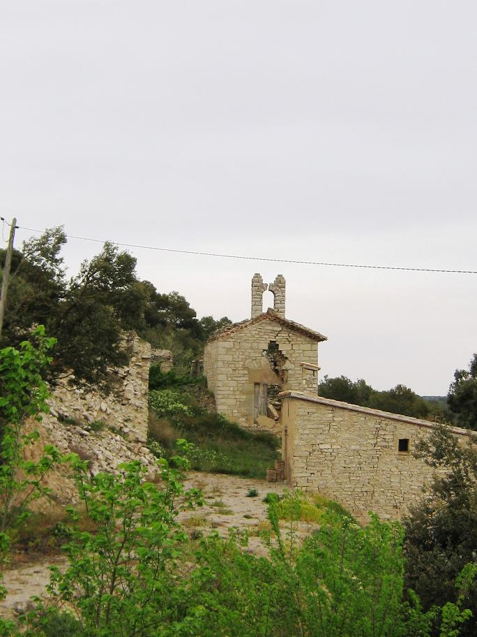 Palamós (Sant Guim de Freixenet)